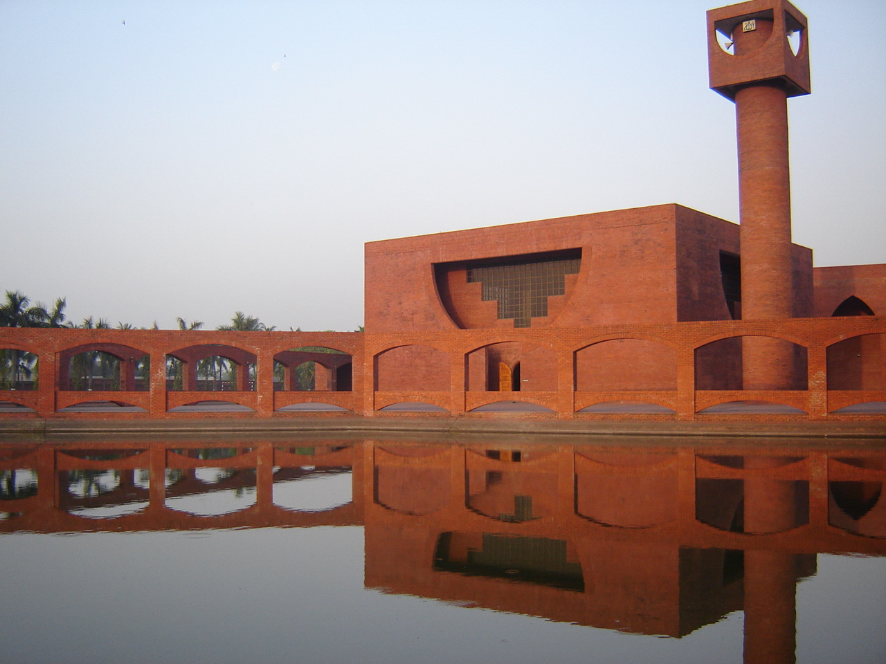 আইউটির হ্রদের পাশে মসজিদ দেখা যাচ্ছে